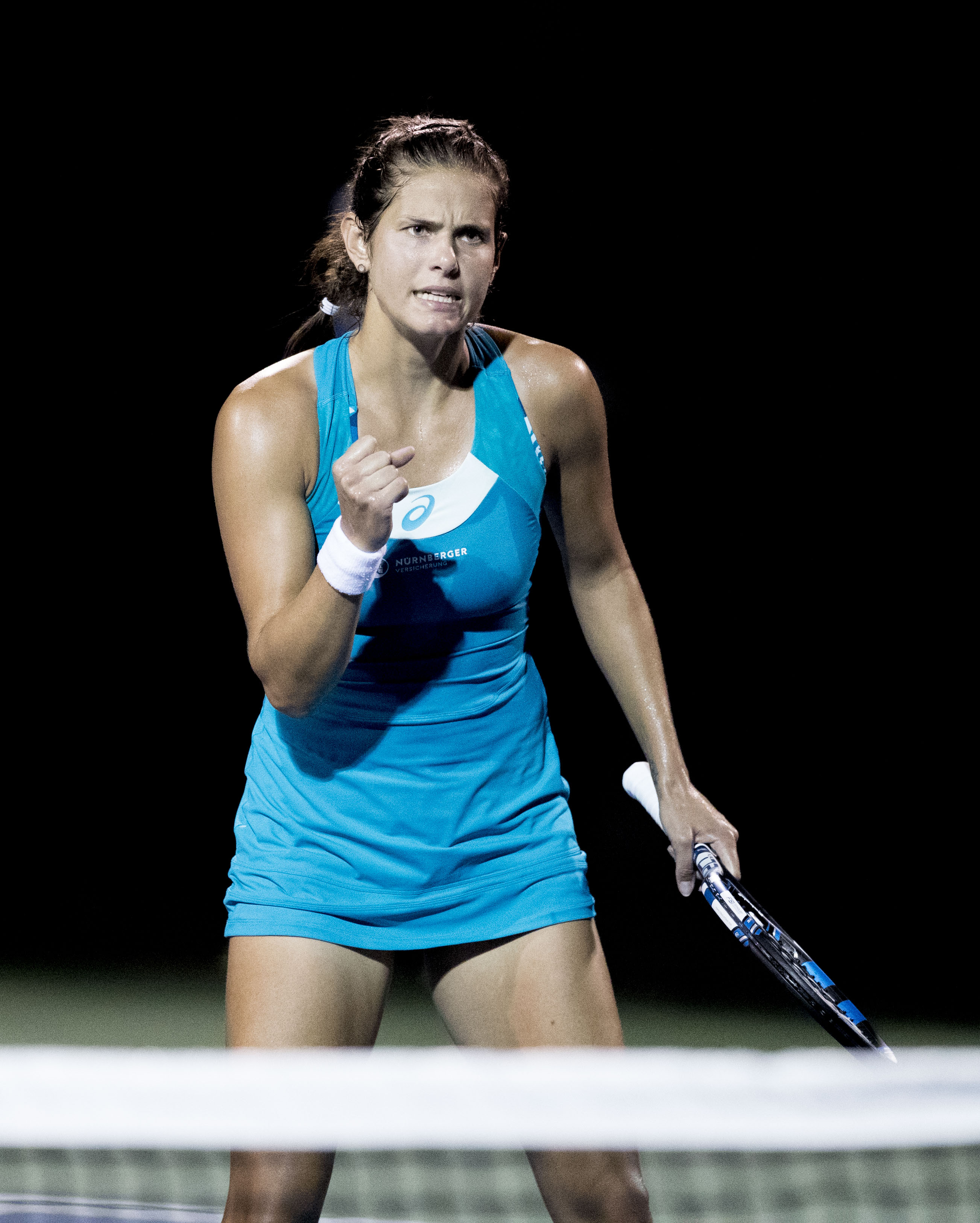 Citi Open Tennis 2017